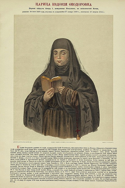 Mniszka Helena (Eudoksja Łopuchina)